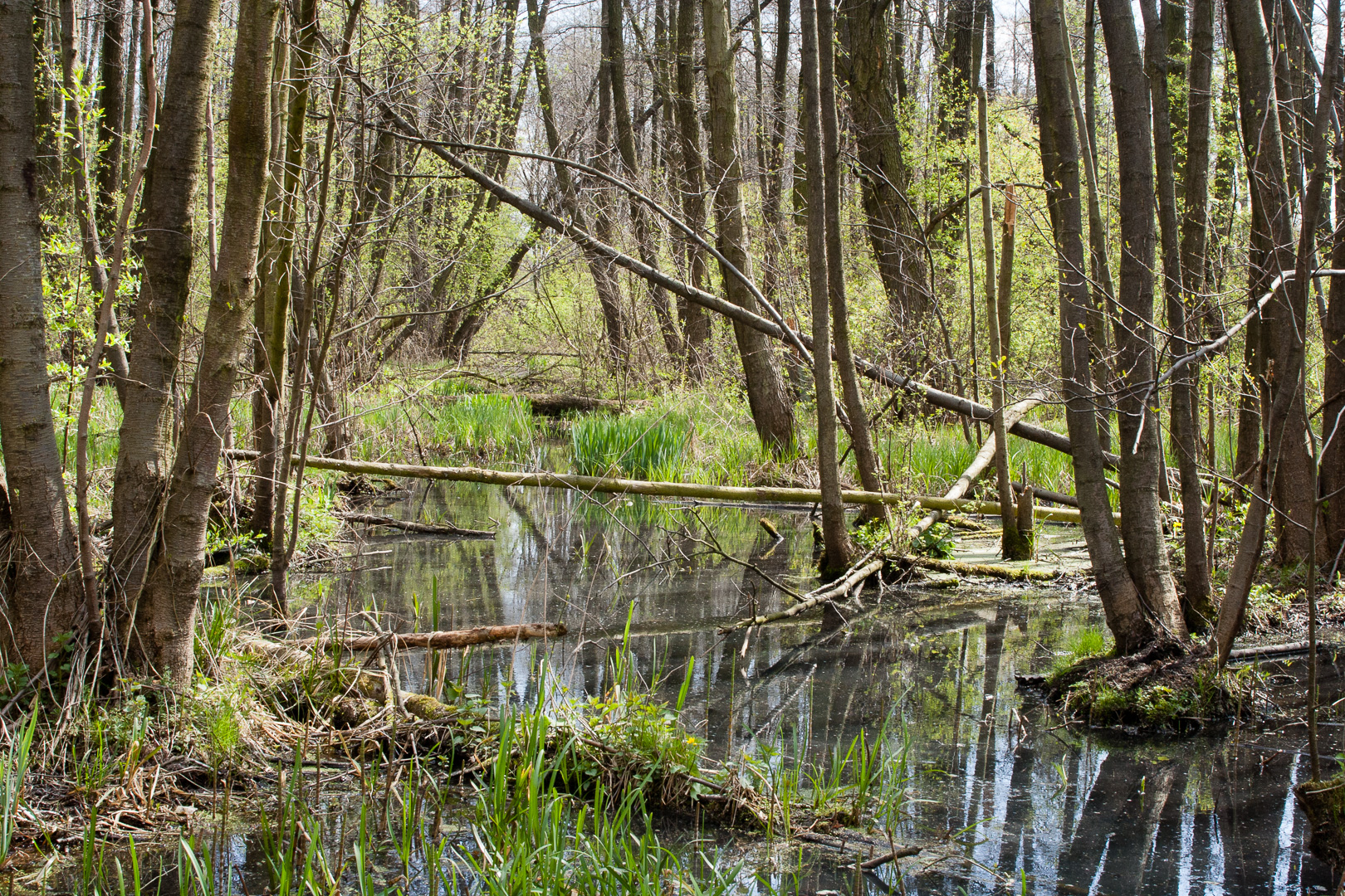 Ols na Zakolu Wawerskim wiosną.